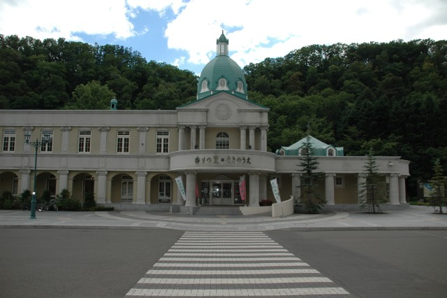 Kaorinosato Takinoue, Michinoeki, Hokkaido, Japan